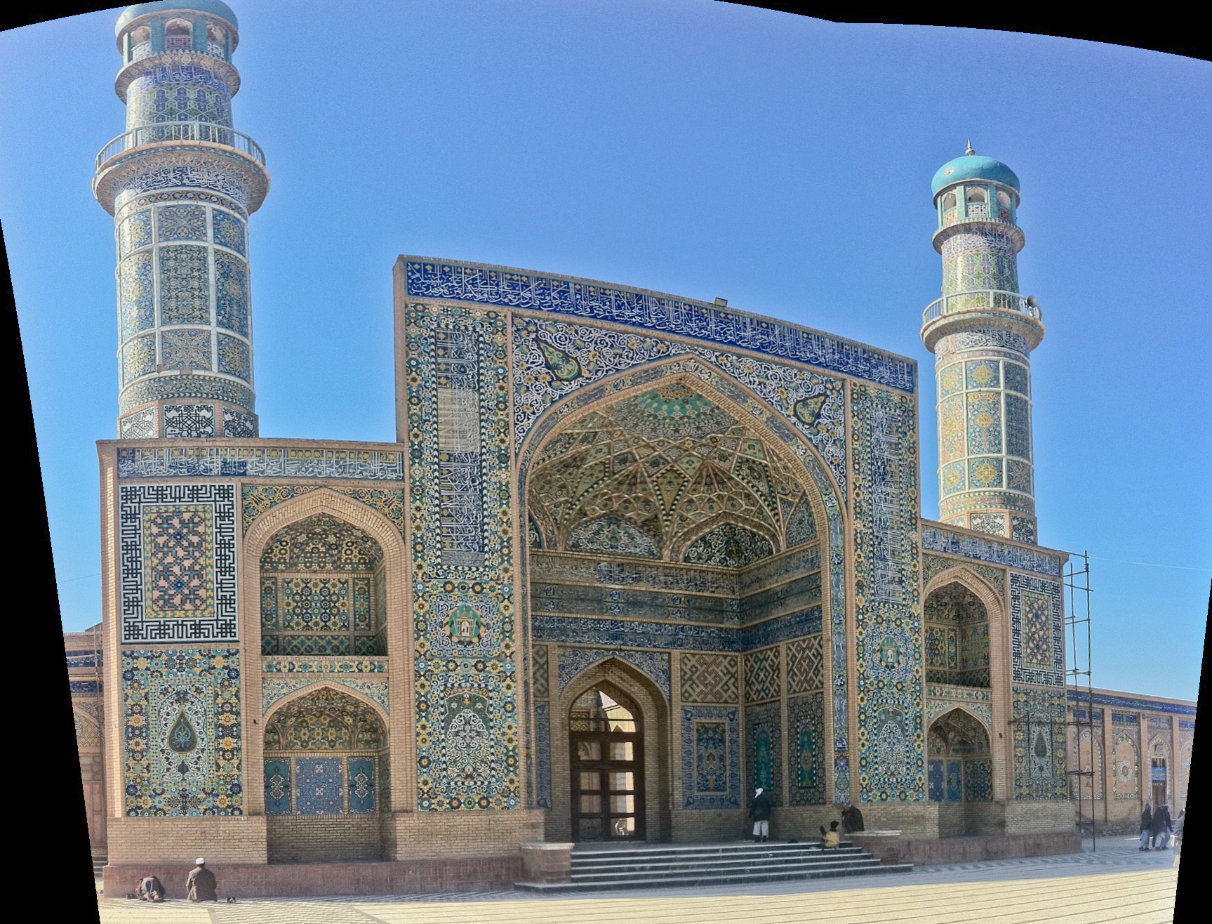 Herat Blue Mosque Panorama